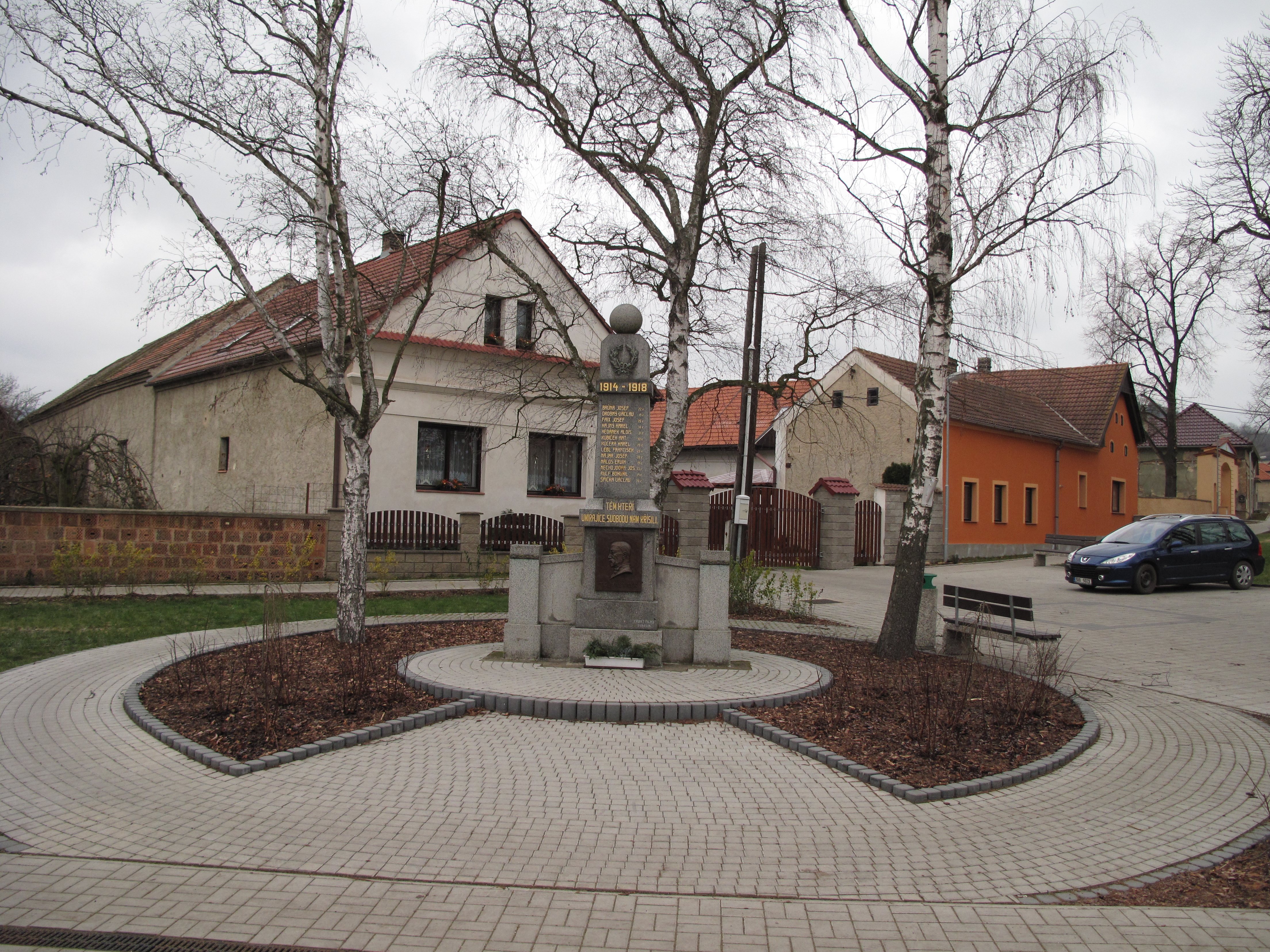 Pomník v Solanech. Okres Litoměřice, Česká republika.